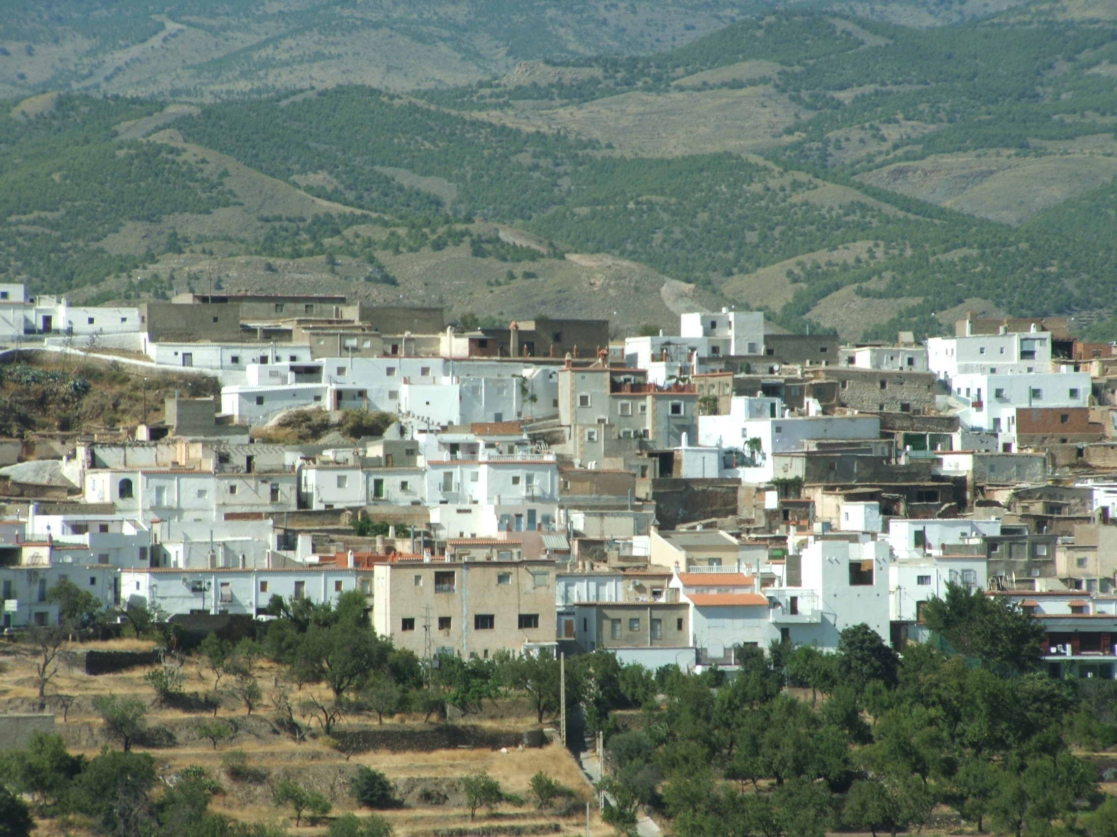 Fiñana (provincia de Almería, España).